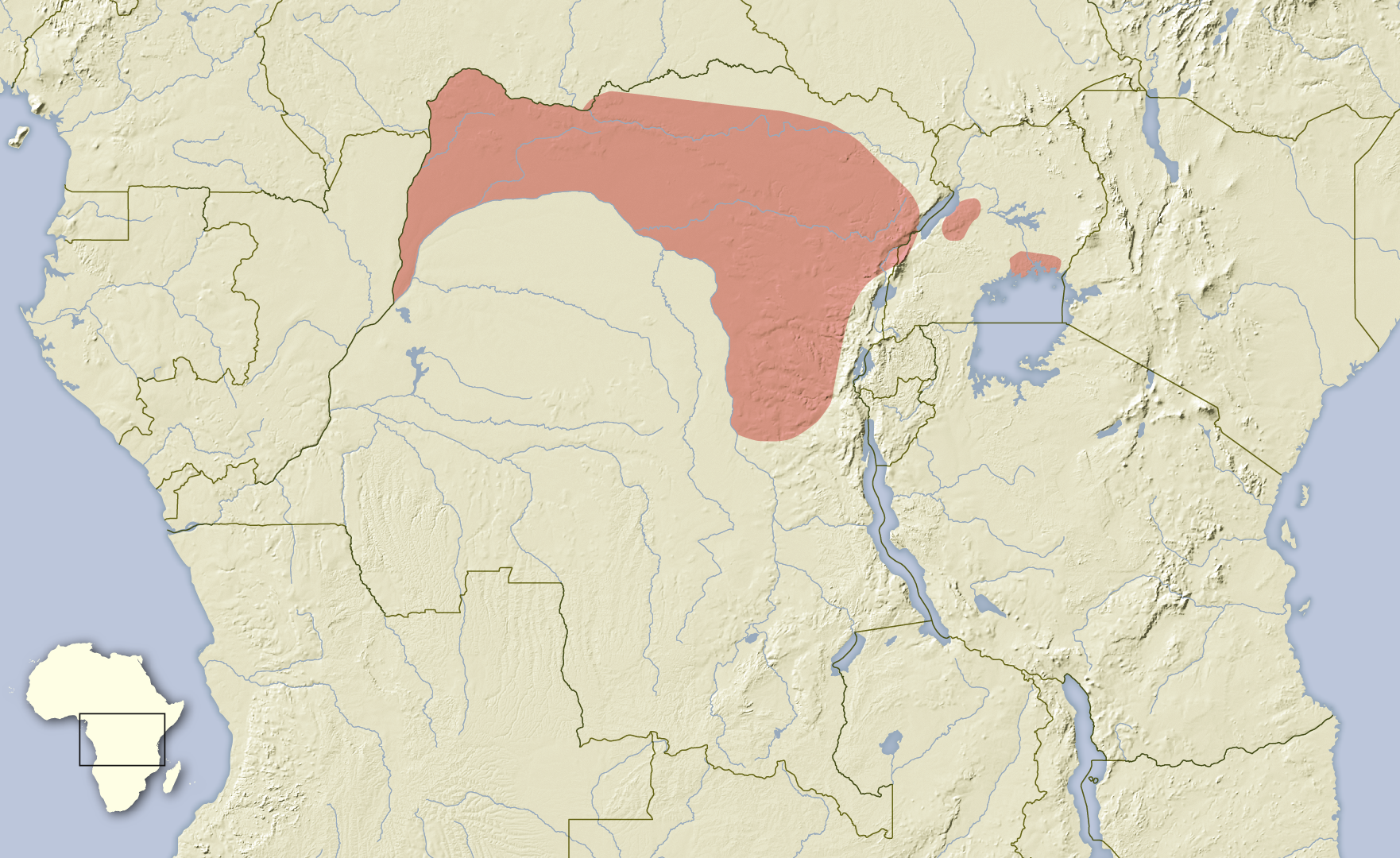 Rhynchocyon stuhlmanni